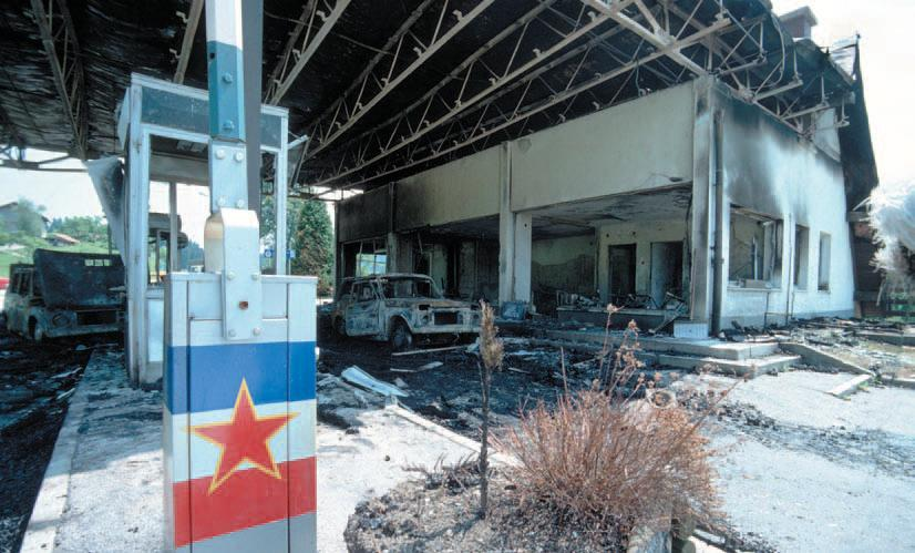 Med spopadi uničeni mejni prehod Holmec.